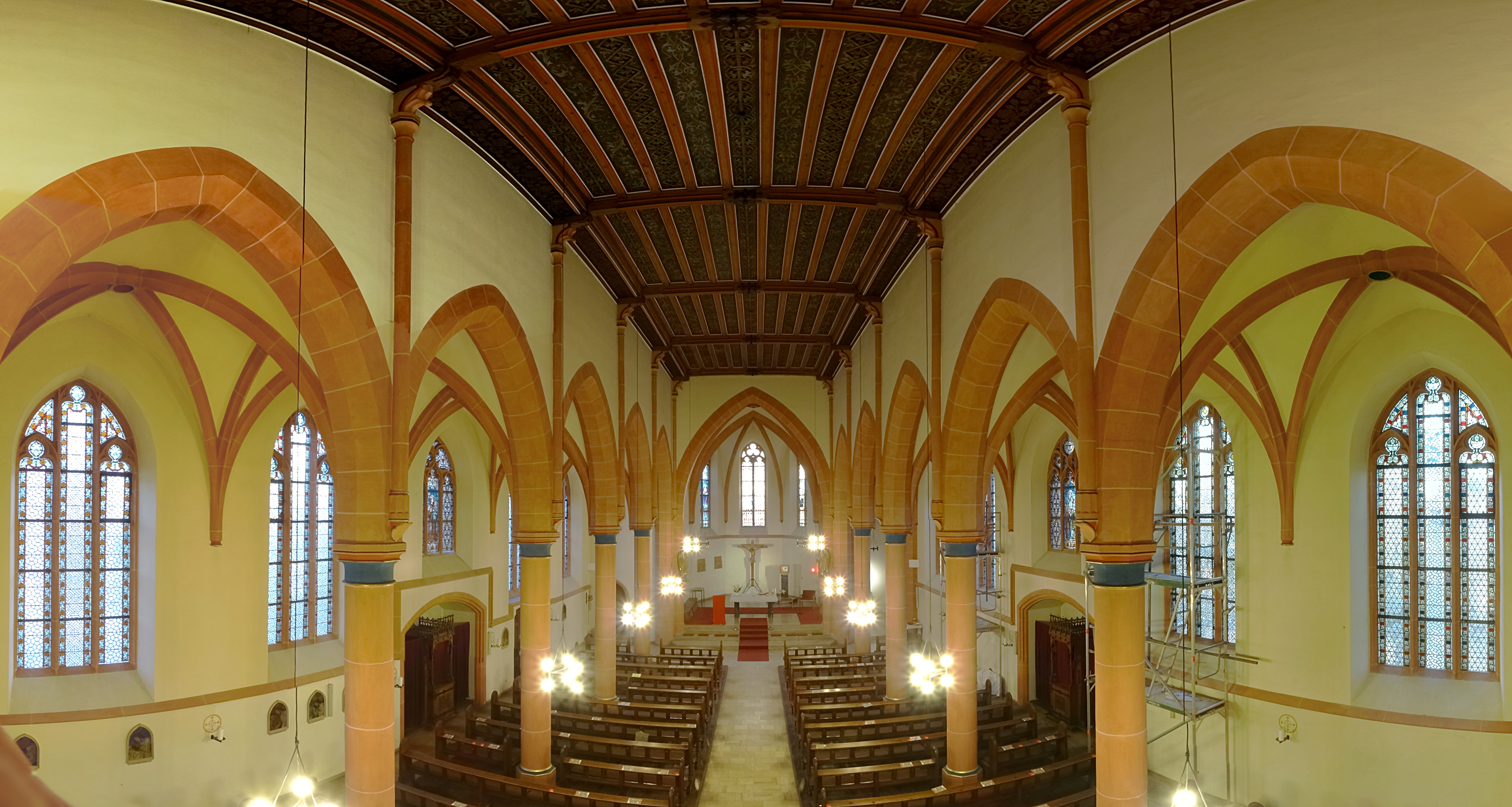 Innenraum Panorama Pfarrkirche St. Bonifatius Apolda